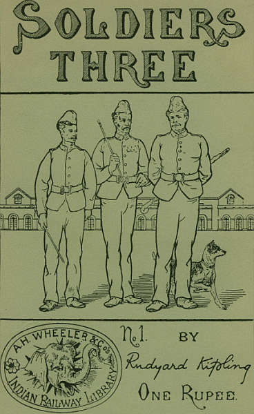 Titel der Originalausgabe von Kiplings "Soldiers Three", 1888, selbst eingescannt.